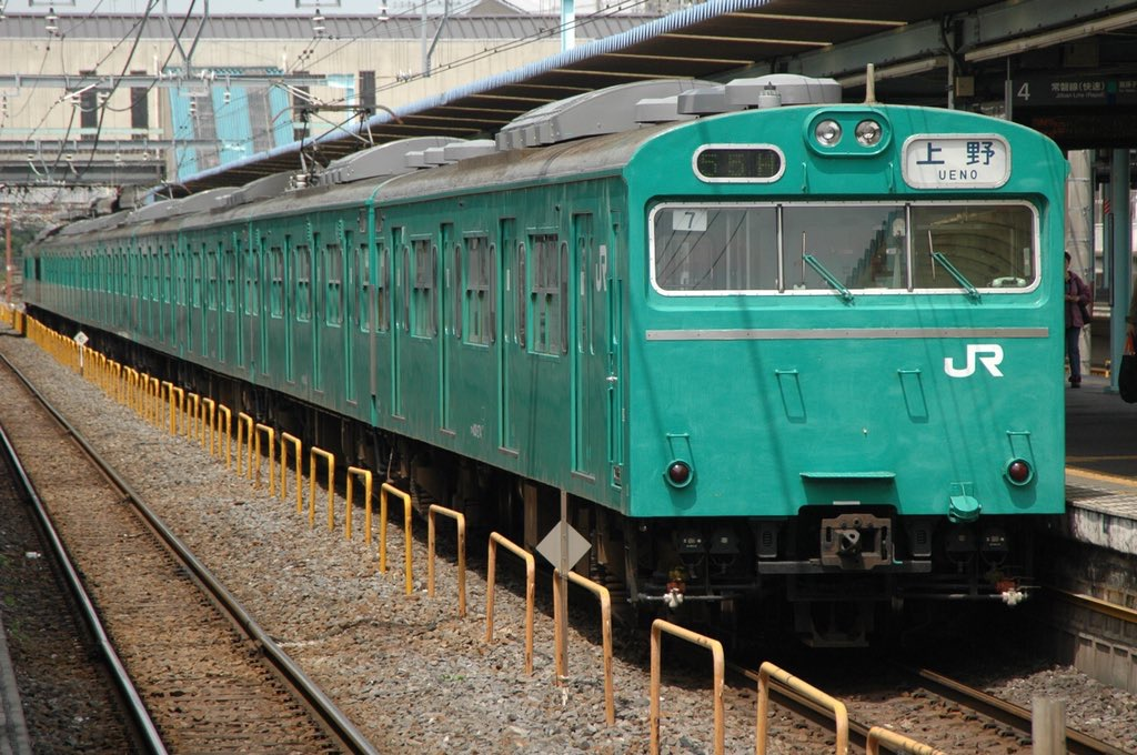 常磐線快速103系0番台マト7編成